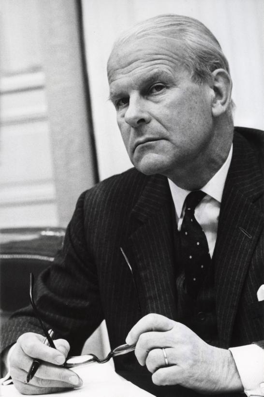 Portret van Minister H.J. de Koster. Henri Johan (Hans) de Koster (1914-1992). Politicus. Minister van Defensie (1971-1973) in het kabinet Biesheuvel. Den Haag, 18-10-1972.